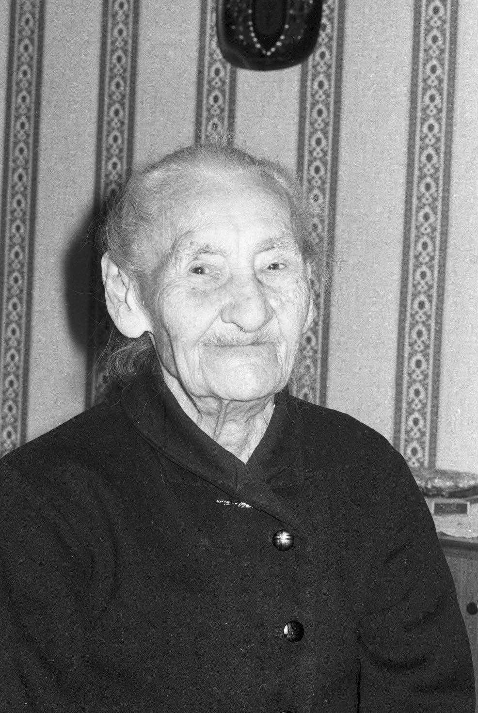 Kiels zweitälteste Bürgerin nach Bertha Nebendahl lebt in der Nissenstraße 44 in Ellerbek.